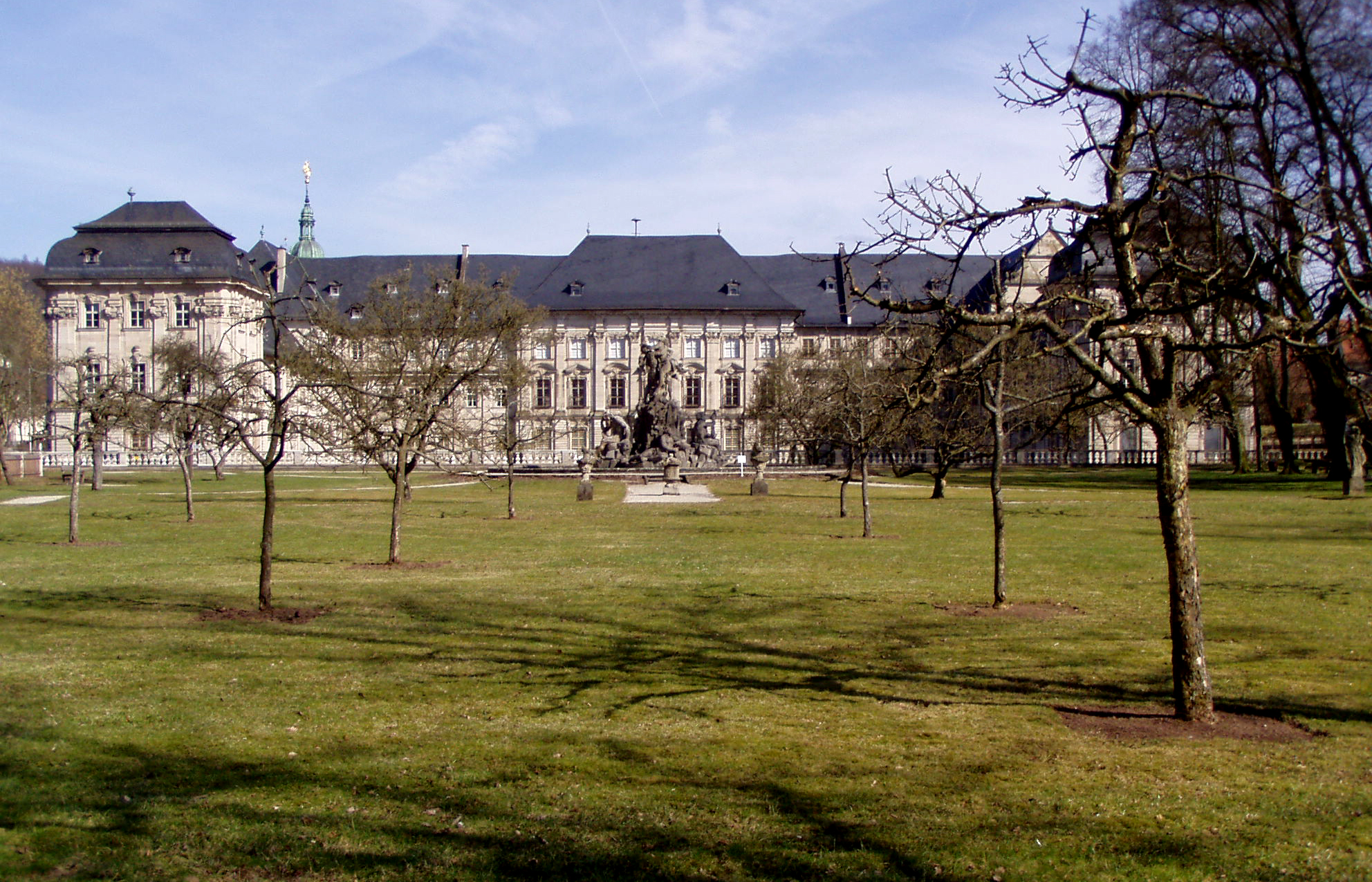 Abteigarten und Abteigebäude ehemalige Zisterzienserabtei Ebrach